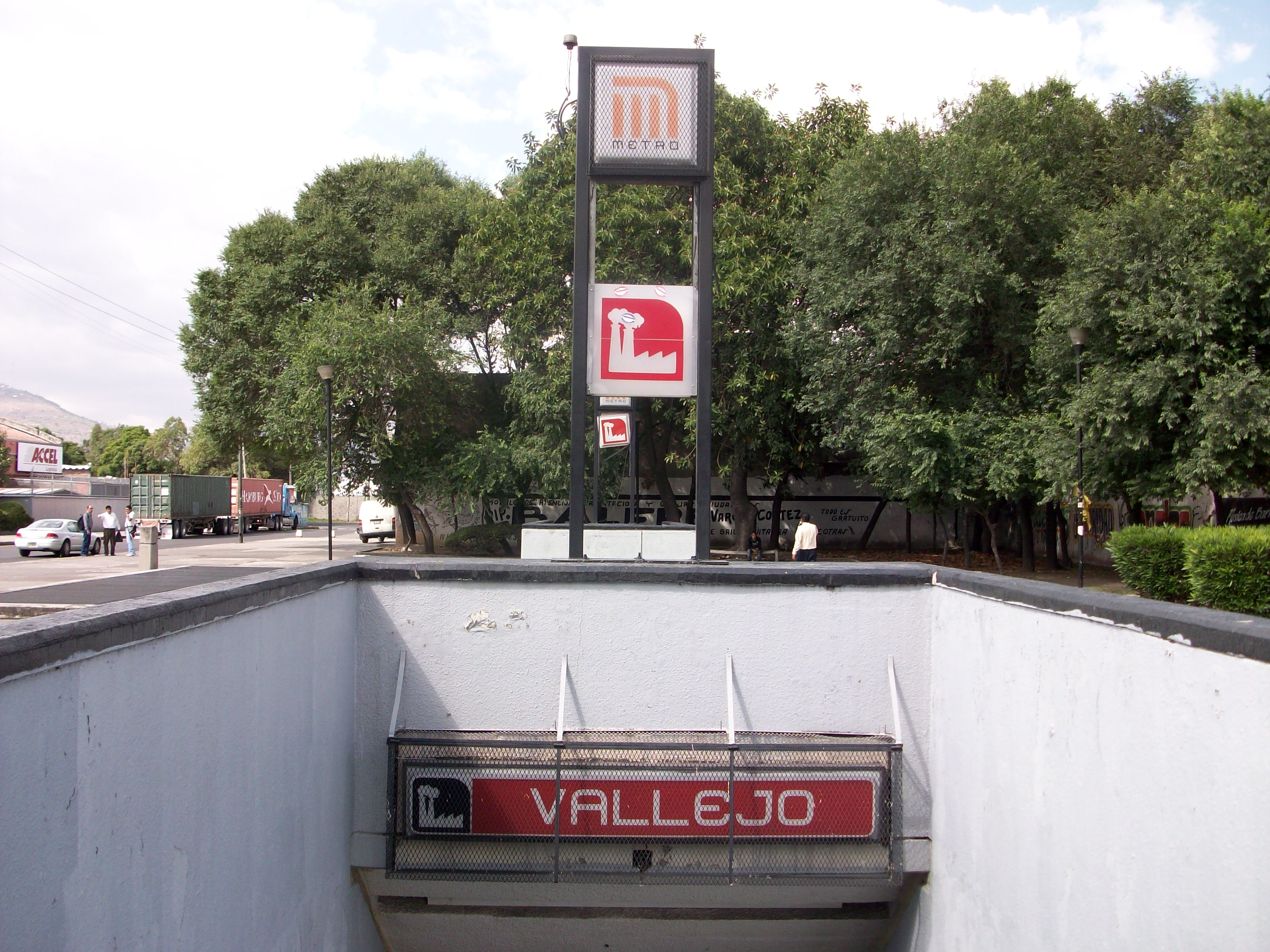 Letrero de la estacion Vallejo